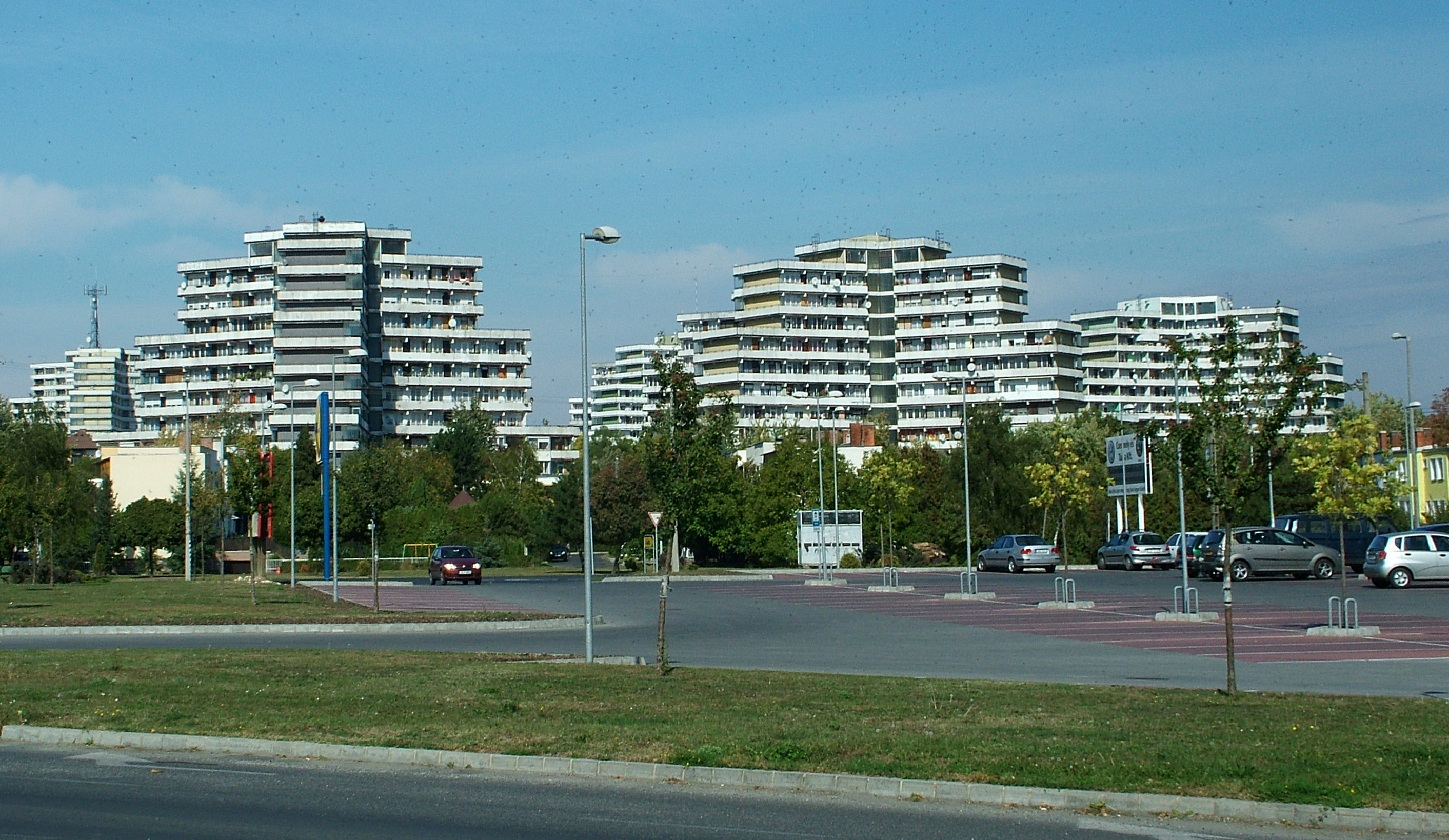 Tapolcai Y-házak (Terv ZÁÉV: Kiss T./Horváth G.)